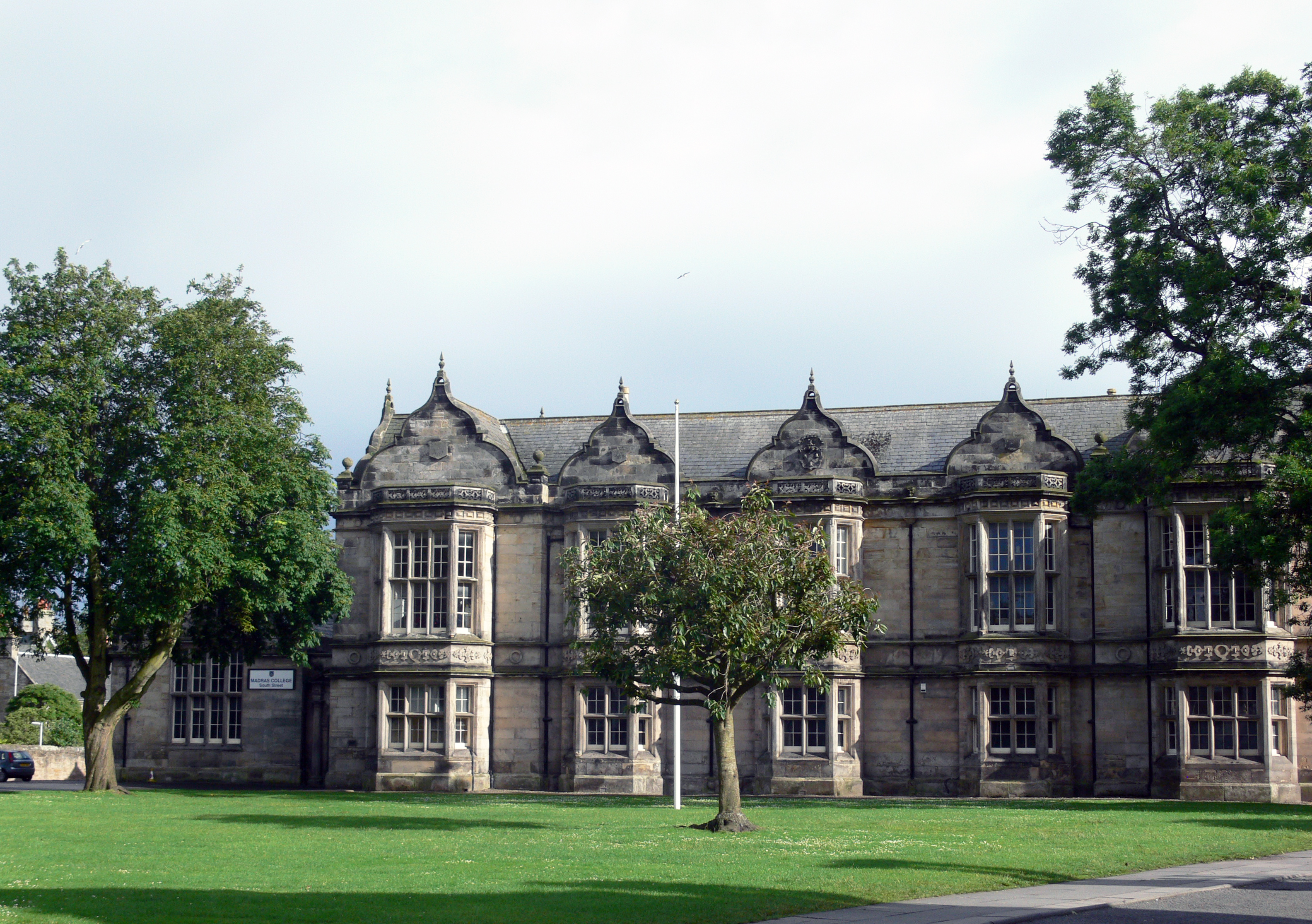 St Andrews - Madras College